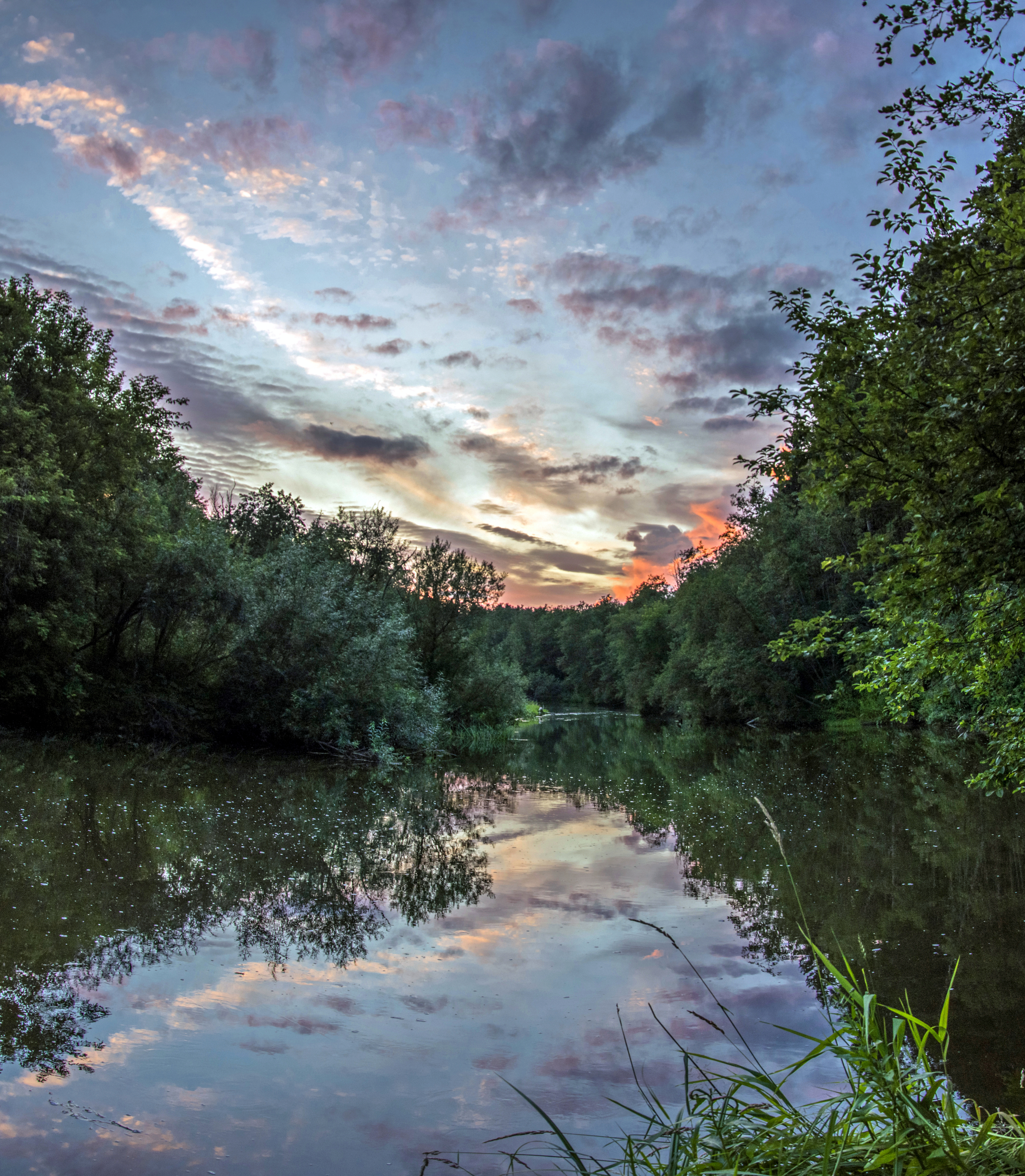 Река Ивкина в Куменском районе Кировской области This image has been uploaded for Wikivoyage travel guide on Кировская область